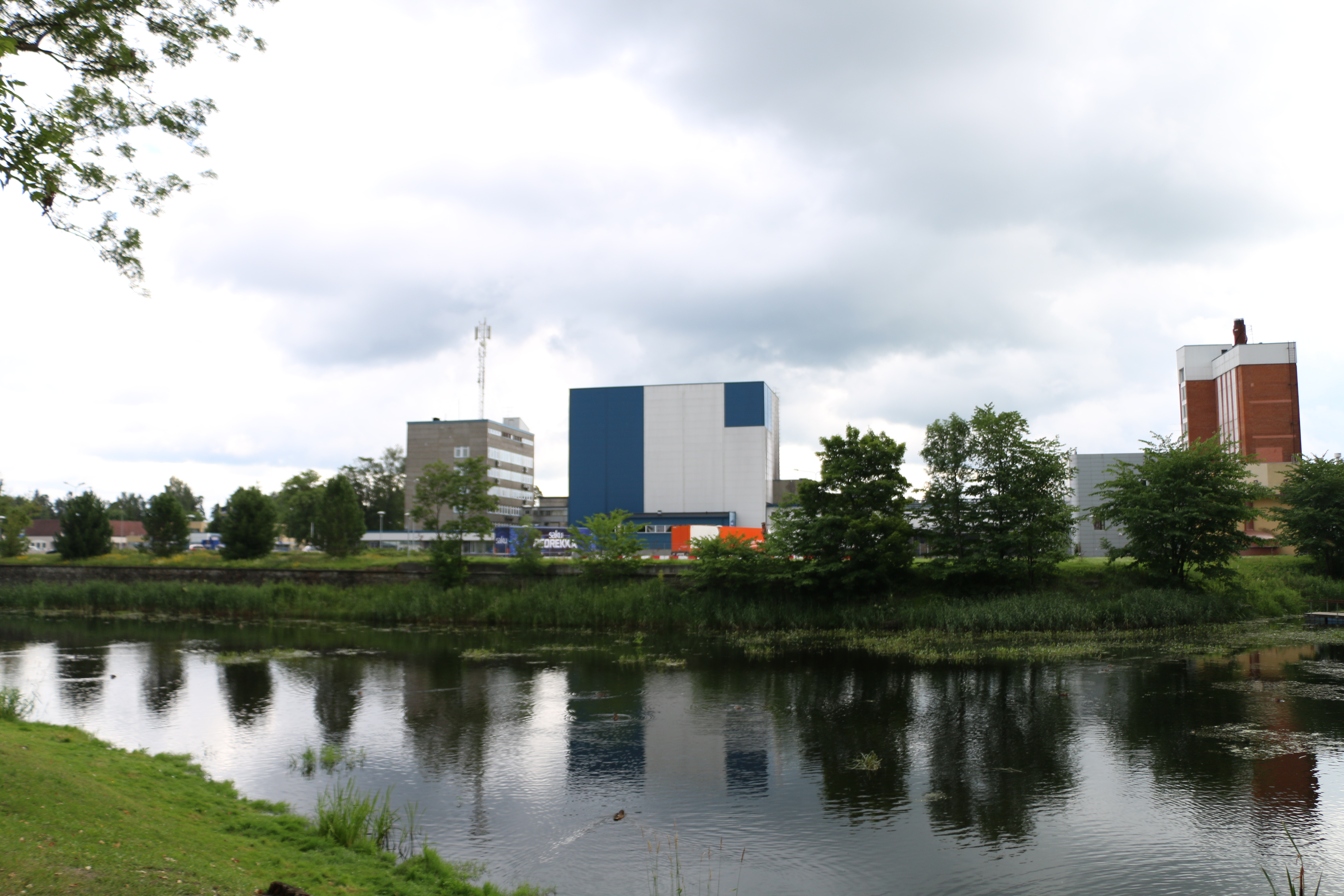 Saku Õlletehase kompleks Saku pargi poolt